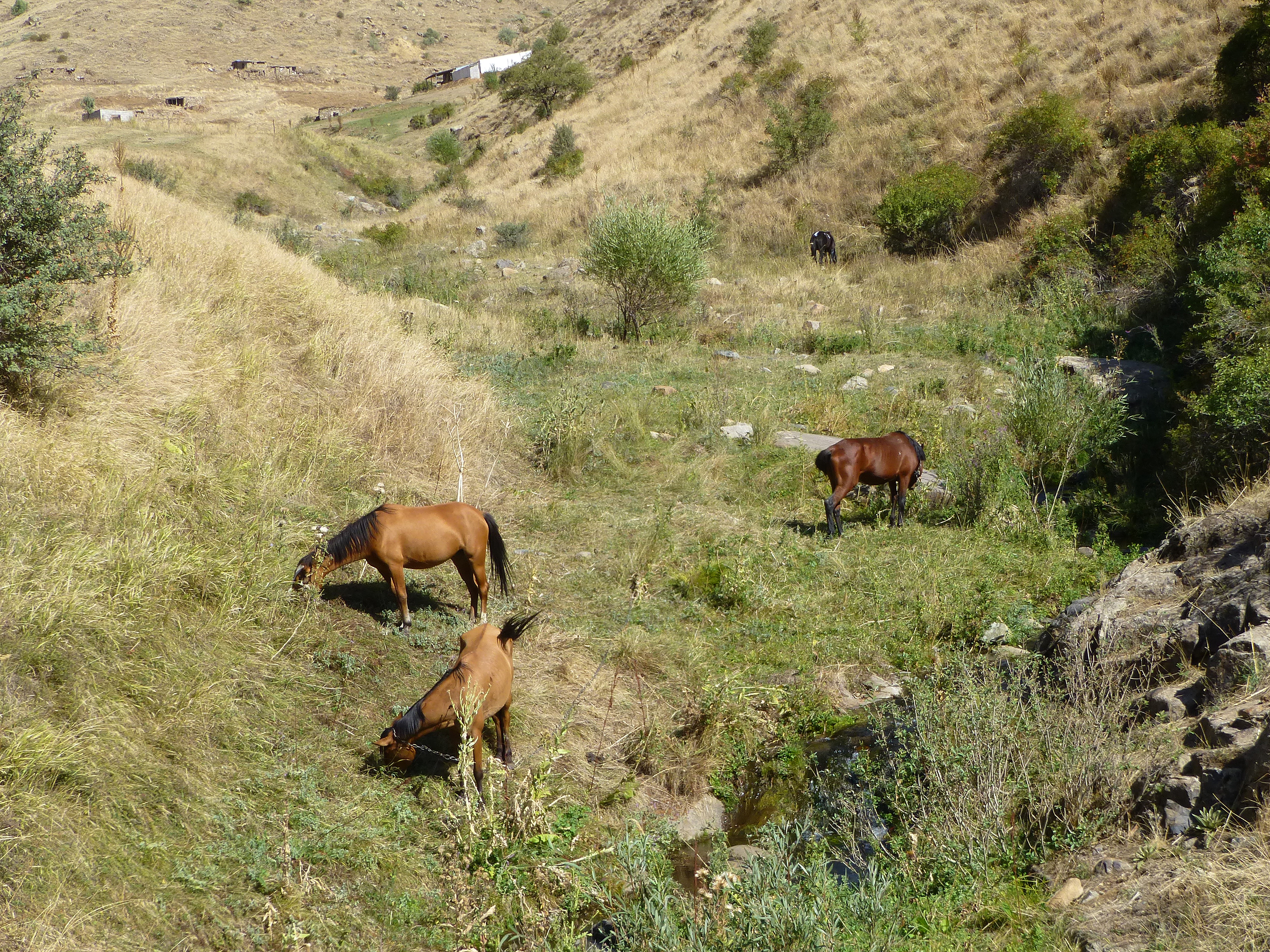 Vallée dans le marz de Vayots Dzor, à quelques kilomètres du monastère de Spitakavor (Arménie).